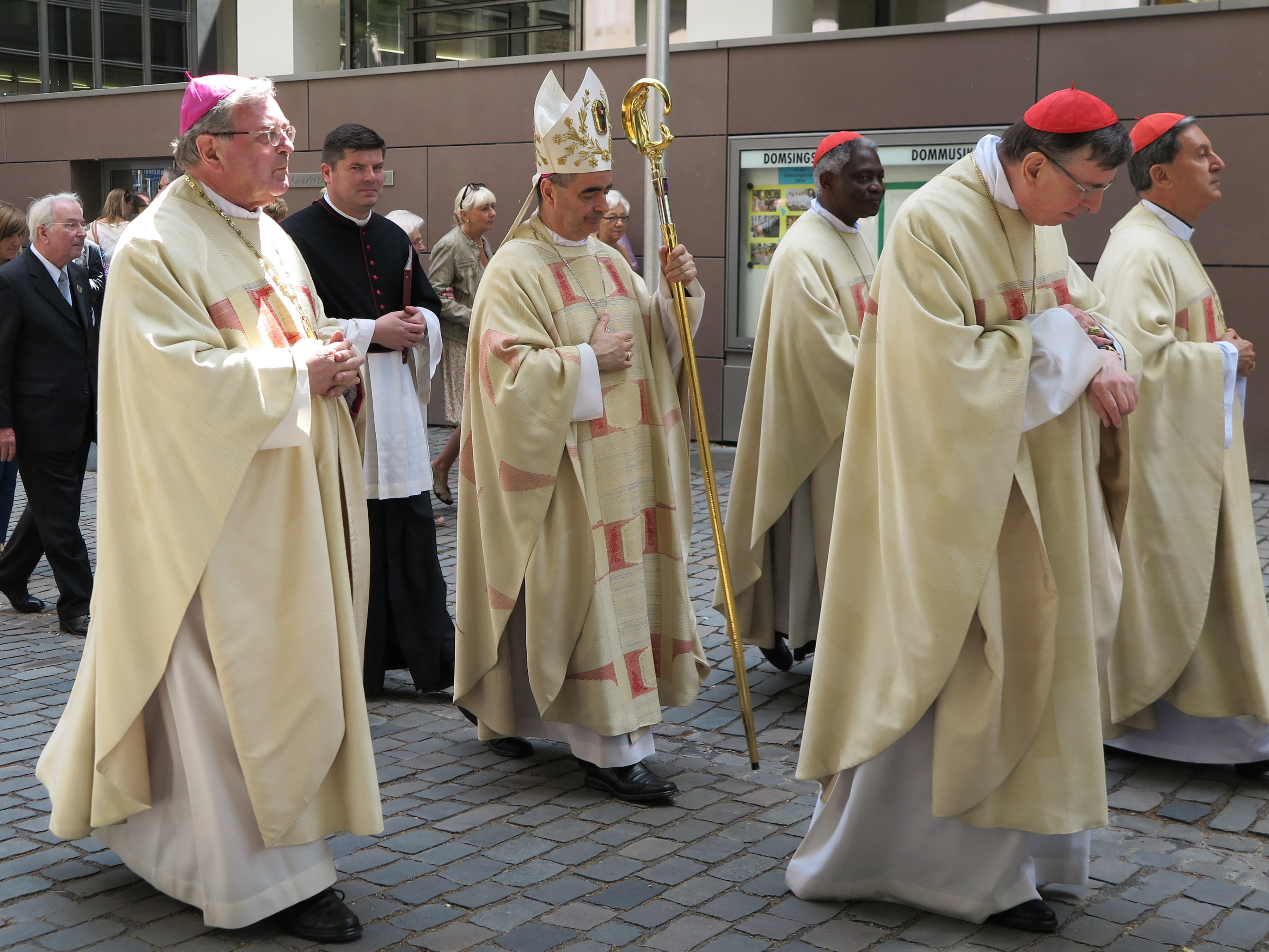 Auszug aus einem Pilgergottesdienst auf dem Katschhof in Aachen anlässlich der Aachener Heiligtumsfahrt 2014. Von links nach rechts: Bischof Heinrich Mussinghoff (Diözesanbischof des Bistums Aachen), Erzbischof Nikola Eterović (Apostolischer Nuntius in Deutschland), Peter Kardinal Turkson (Kurienkardinal und Präsident des päpstlichen Rates für Gerechtigkeit und Frieden), Kurt Kardinal Koch (Kurienkardinal und Präsident des päpstlichen Rates zur Förderung der Einheit der Christen) und Rubén Kardinal Salazar Gómez (Erzbischof von Bogotá)